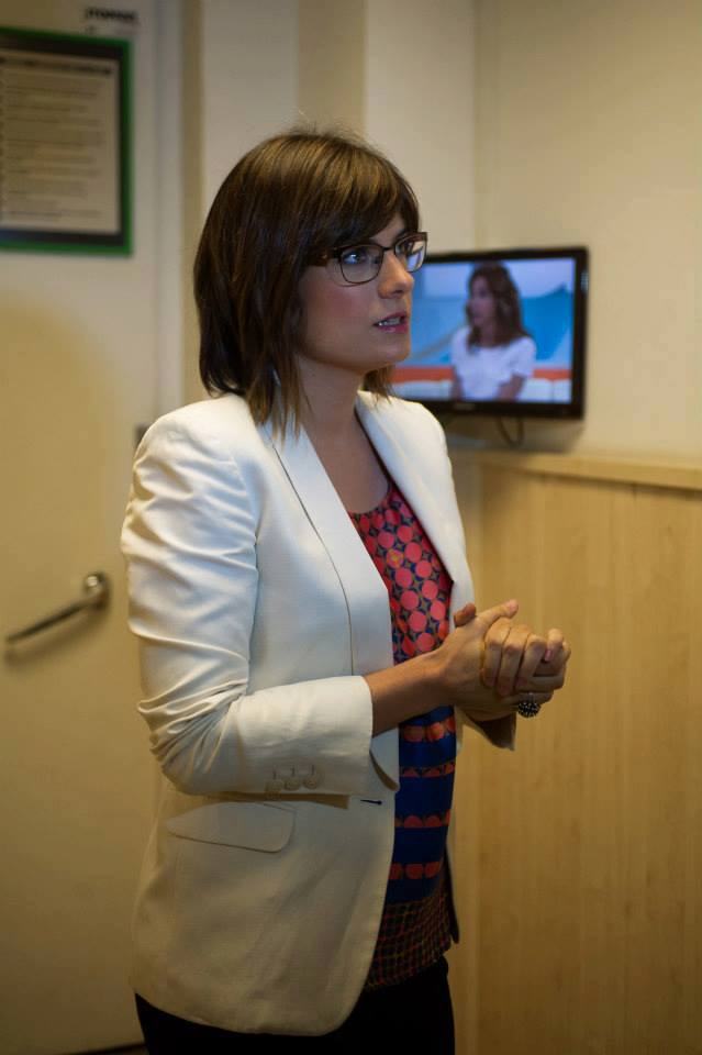 Ariadna Oltra, periodista.